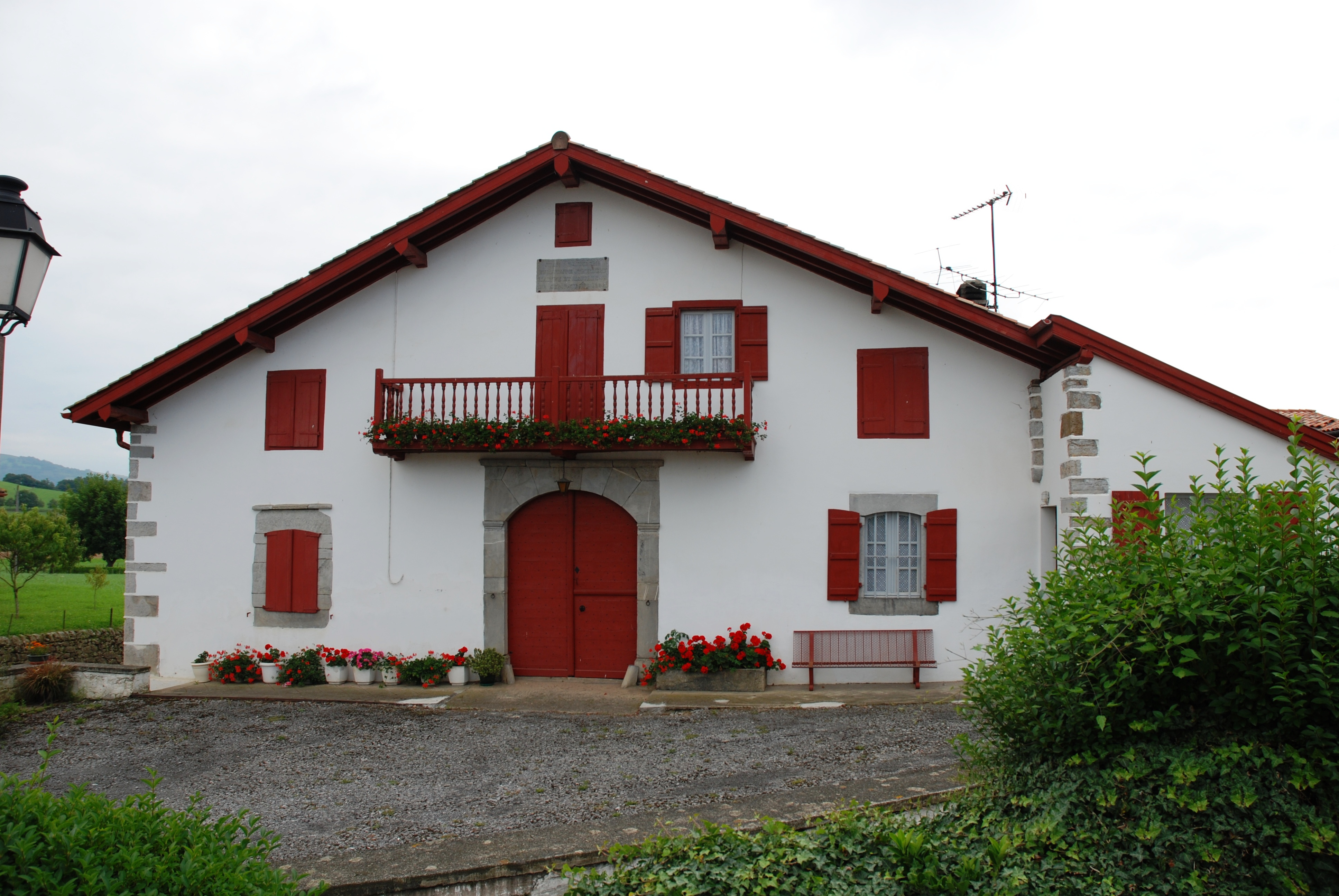 Armendarits, maison de Basse-Navarre